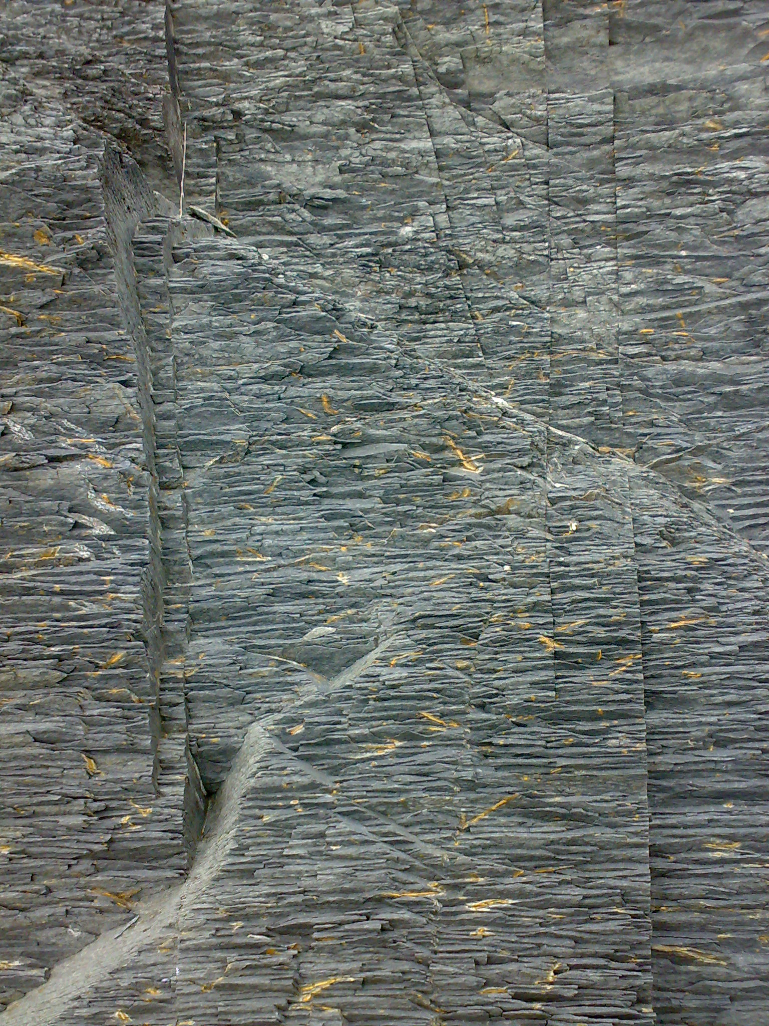 Skifer i Oslofjorden, Oslofeltet